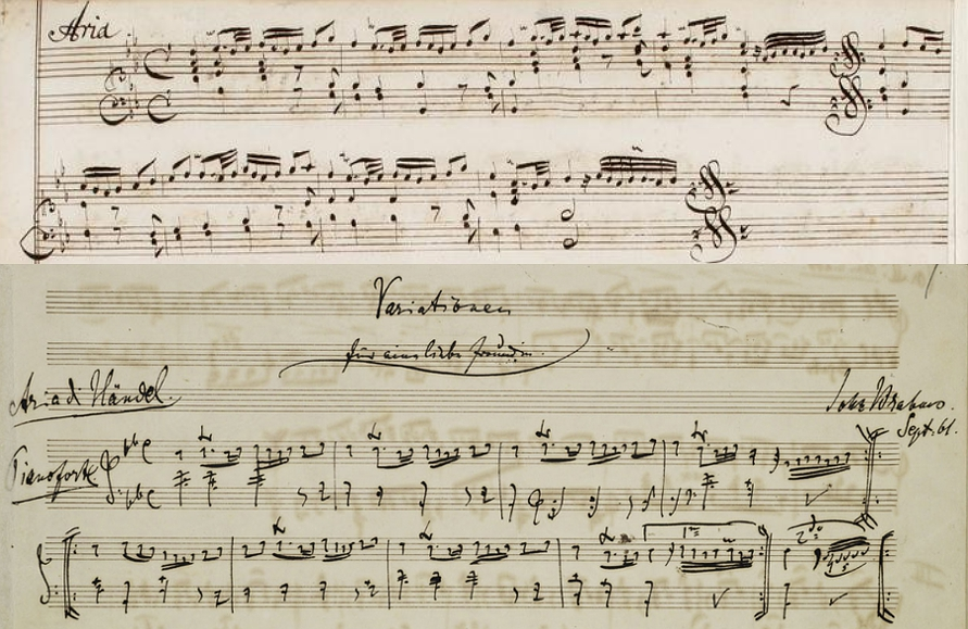 Vergleich des Themas der Variationen aus der Suite B-Dur HWV 434 von Georg Friedrich Händel und der Fassung des Themas in Johannes Brahms' op. 24. (Ausschnitte aus den Handschriften der Komponisten)